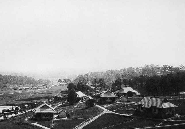 Da Lat 1920s, l'emplacement de l'hotel du Lang Biang